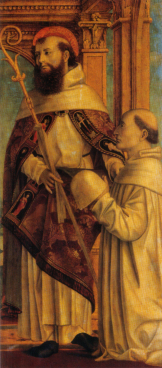 Bernardino Zenale - San Michele arcangelo, san Guglielmo da Vercelli e un monaco cistercense. Uffizi, Firenze. 1490 ca.